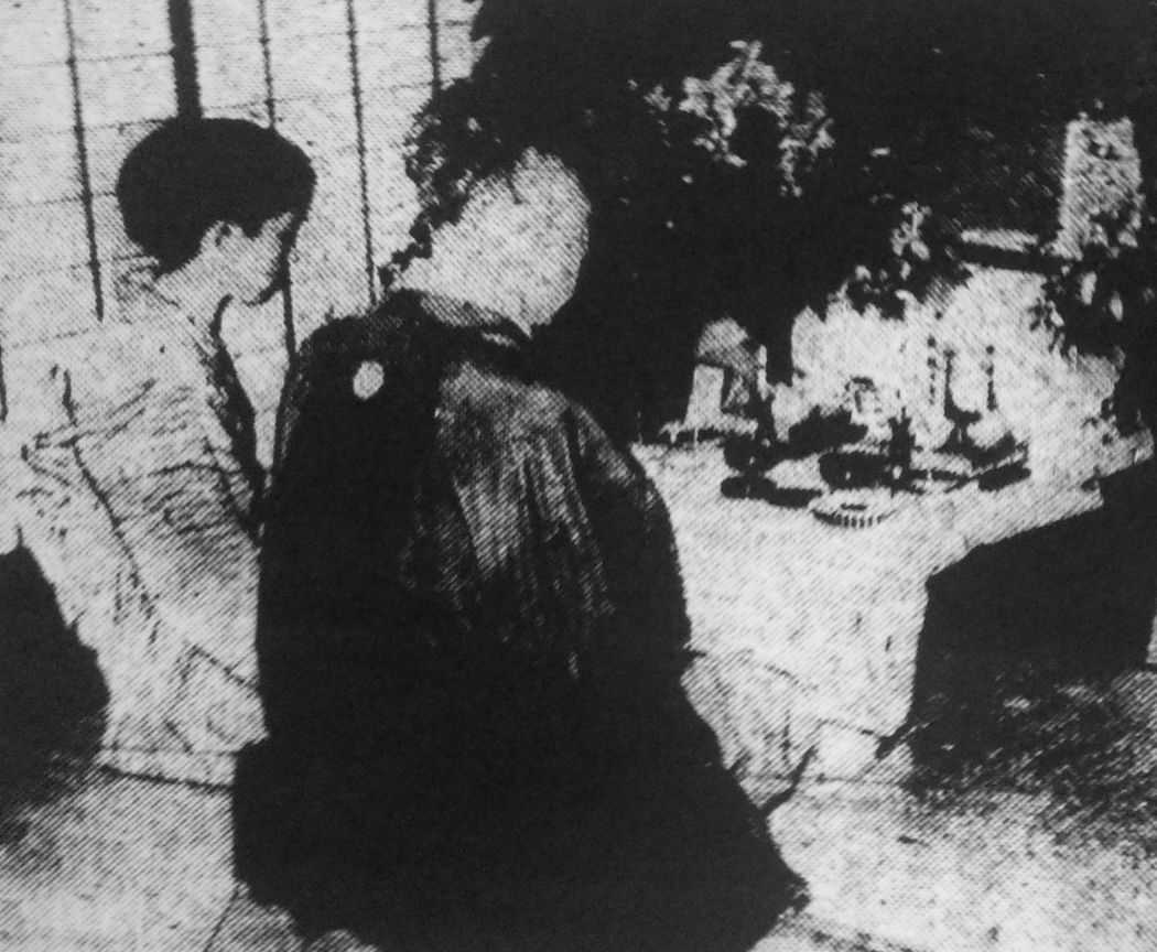 小笛事件の遺族